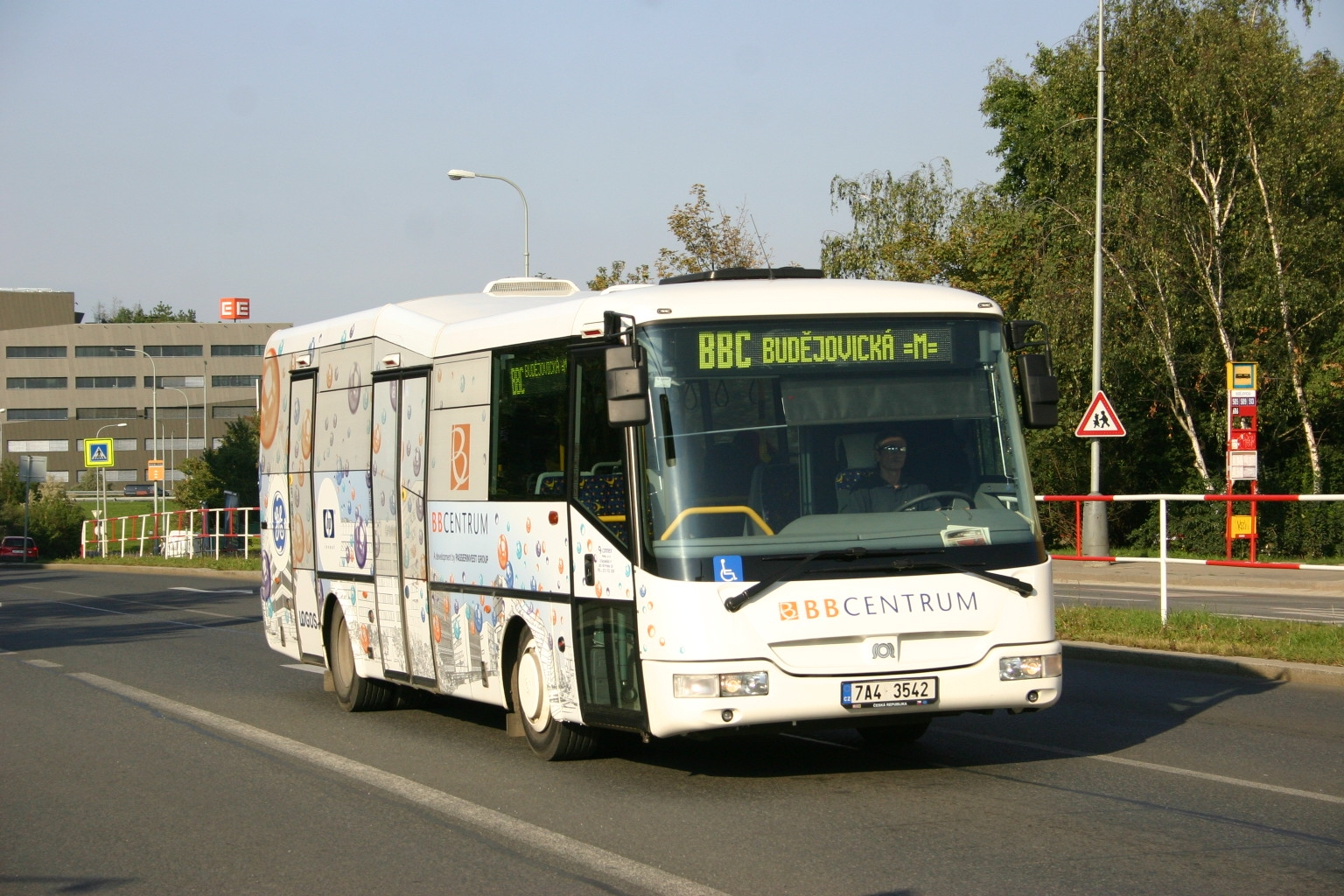 SOR BN 9,5 dopravce Veolia Transport Praha na lince Budějovická – BB Centrum, snímek pořízen v Michli ve Vyskočilově ulici u křižovatky s ulicí Budějovická.